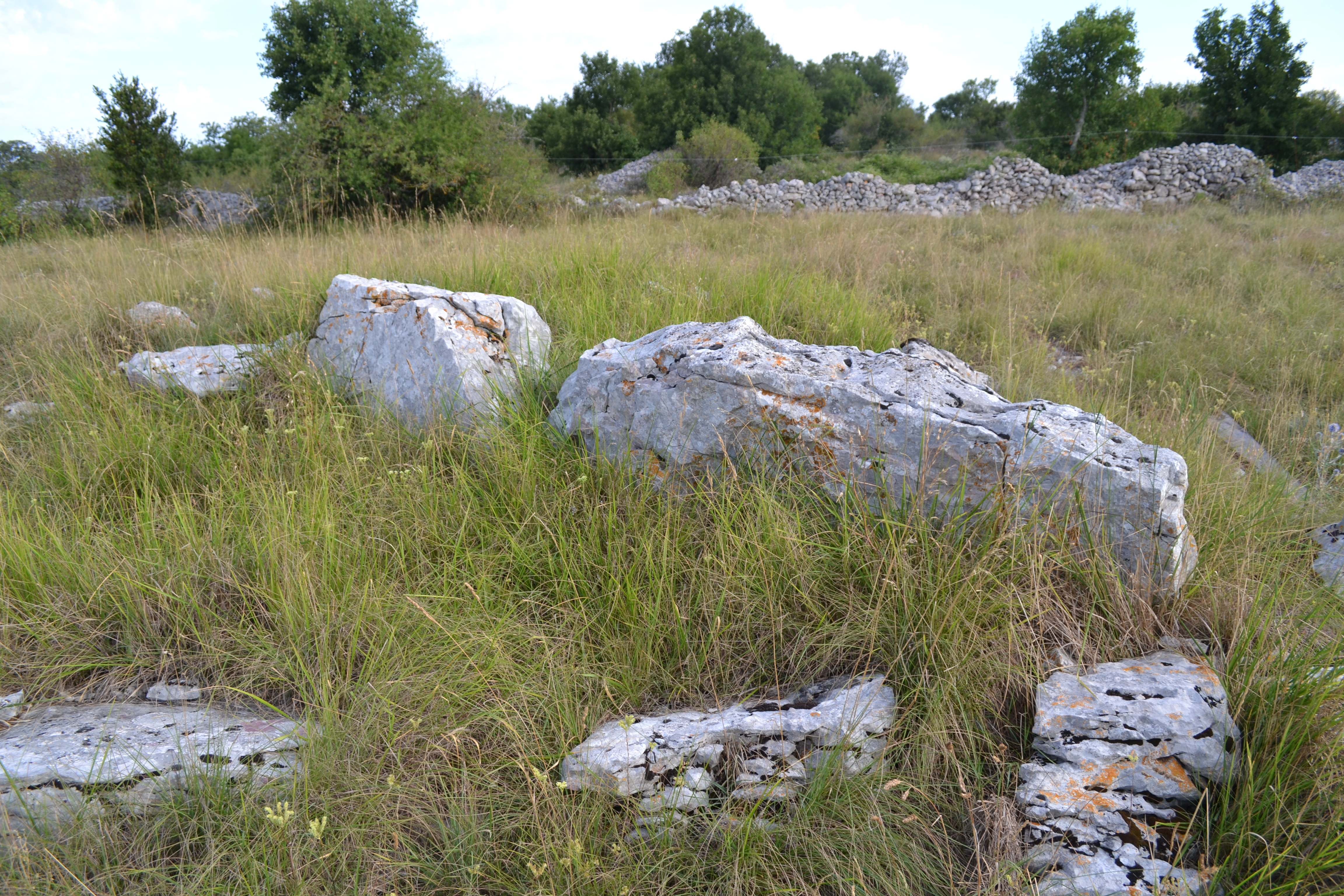 Menhir d'Angles à Saint-Pierre-de-la Fage (34).